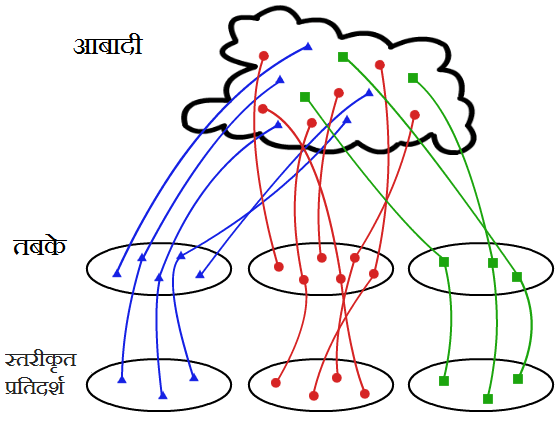 स्तरीकृत प्रतिचयन